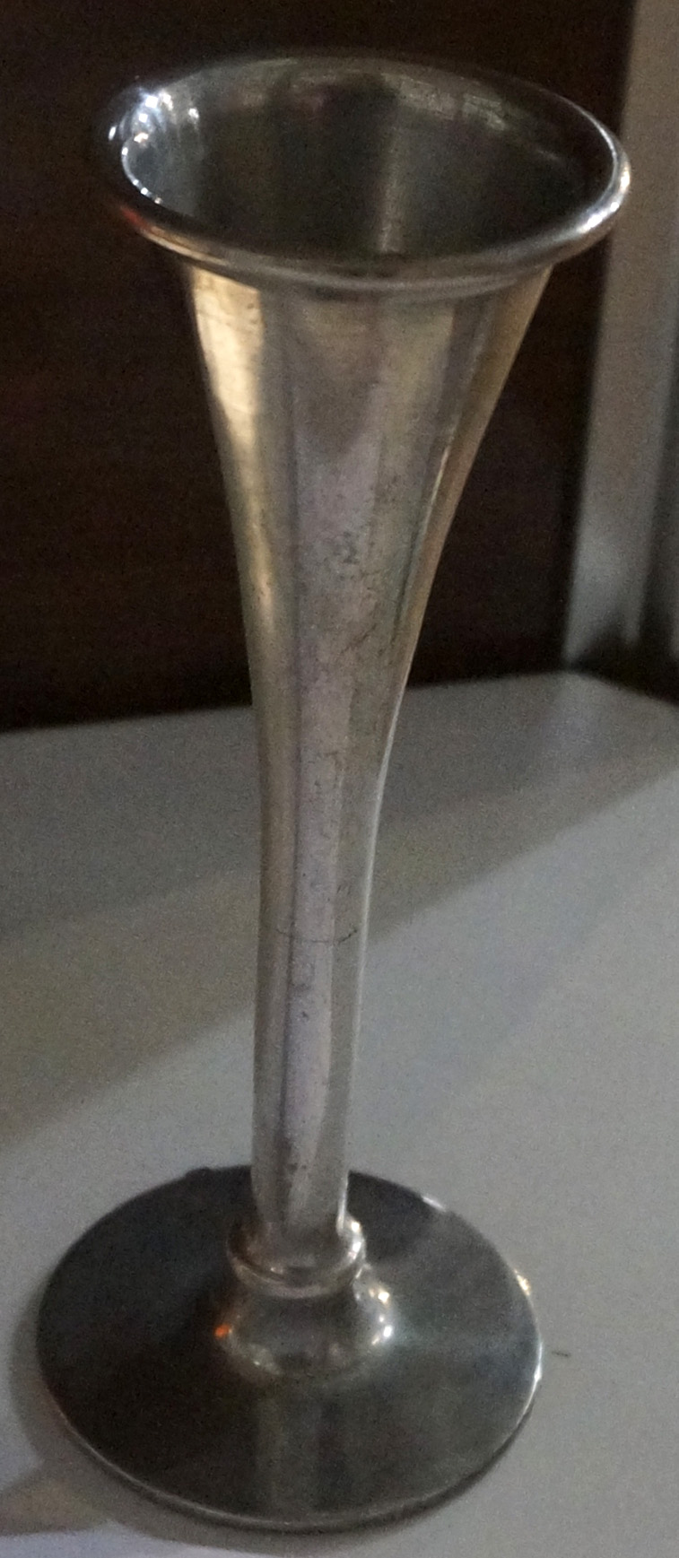 Lors de l'exposition Vitry ville hôpital 1914 2014.